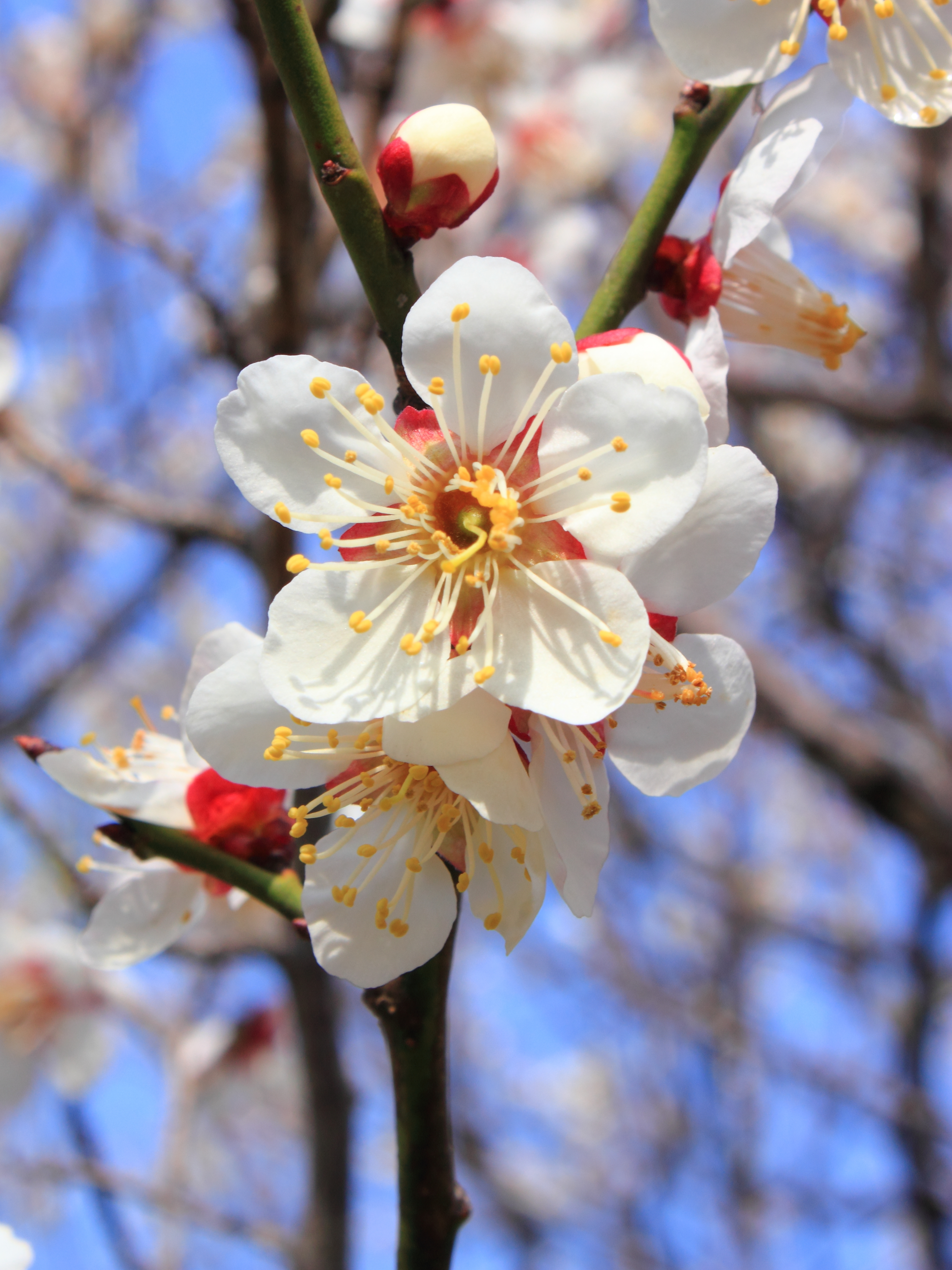 ウメの花（白梅）・東京都杉並区立角川庭園にて